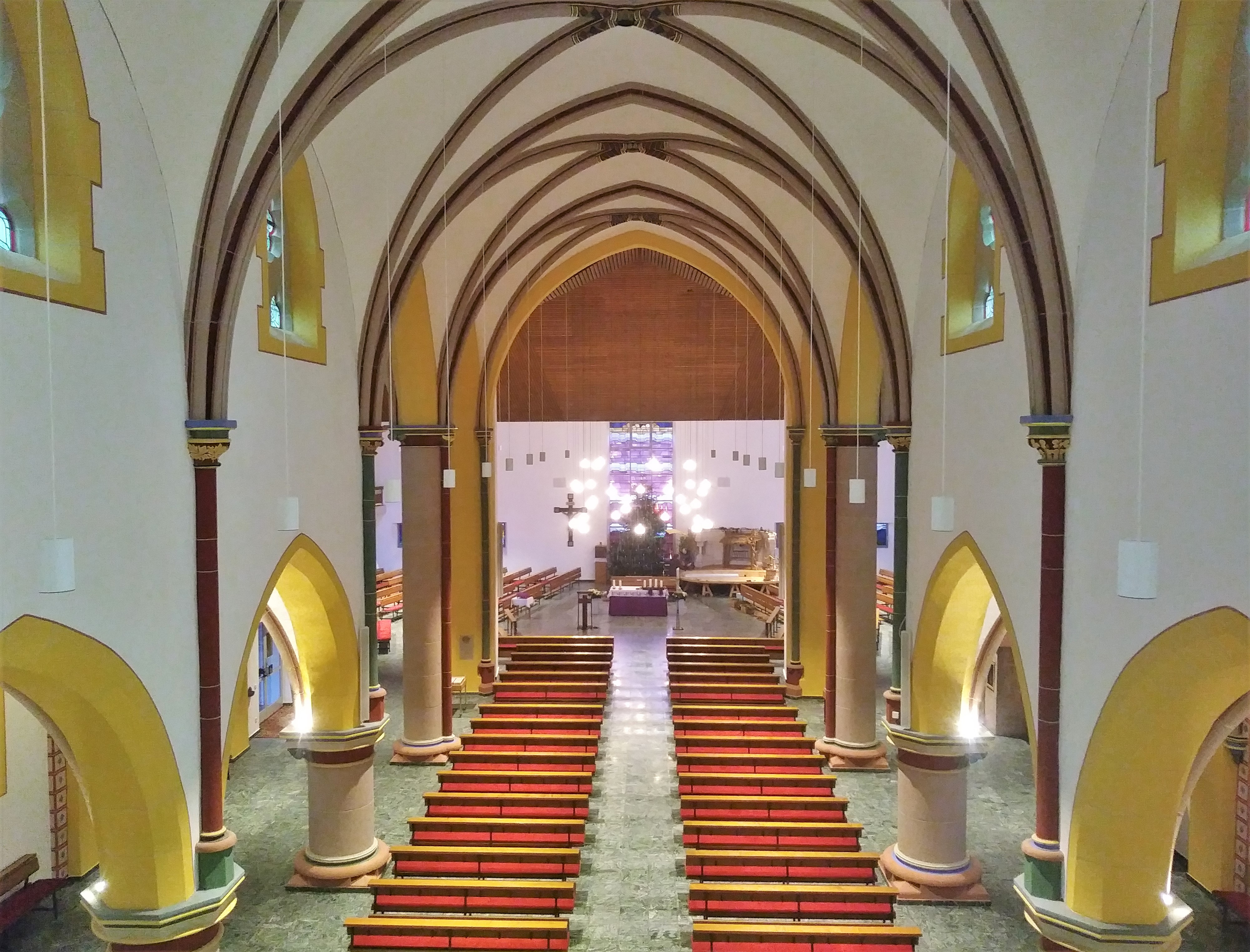 St. Bartholomäus Hasborn-Dautweiler nach der umfangreichen Innenrenovierung 2019